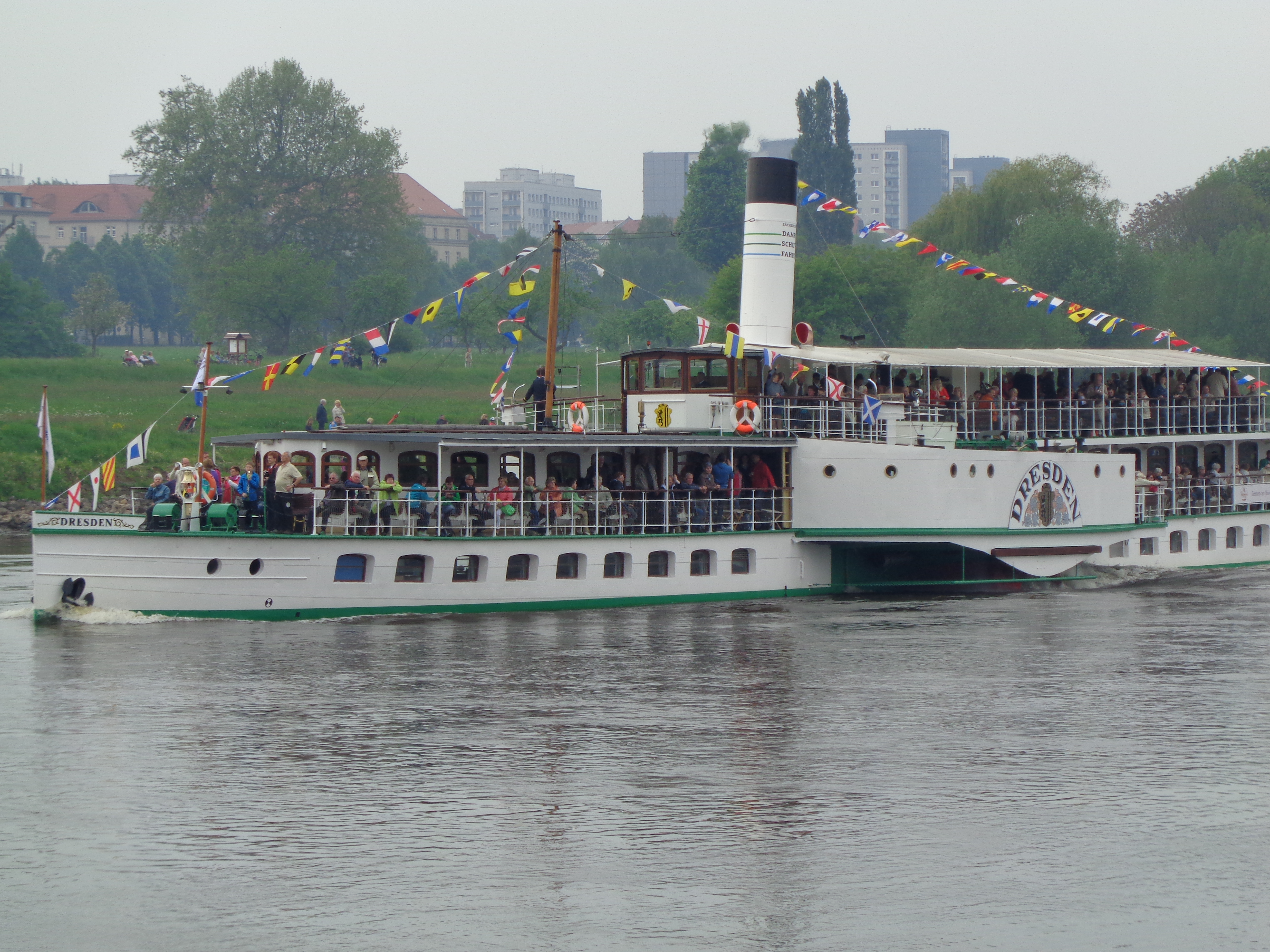 Dresden: Dampferparade Sächsische Dampfschiffahrt 1. Mai 2014. An der Waldschlößchenbrücke